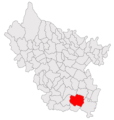 Categorie:Hărţi ale judeţului Buzău